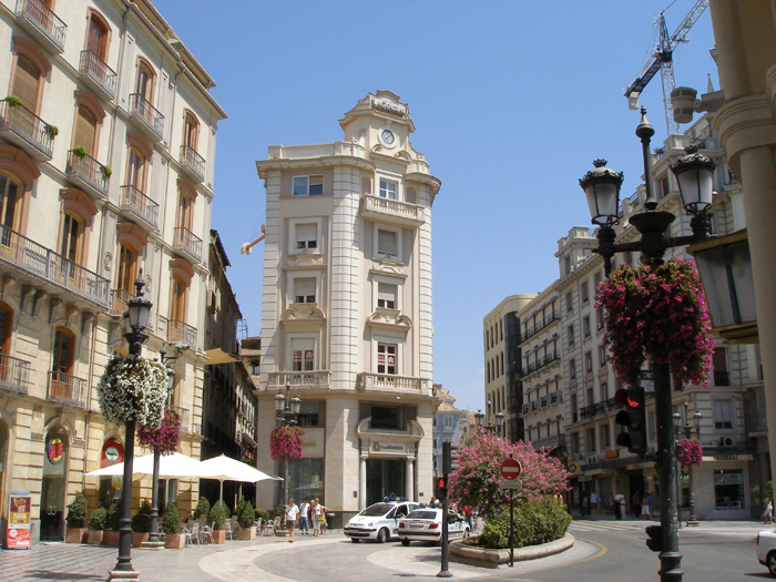 Plaza de Puerta Real de España. Granada, España.